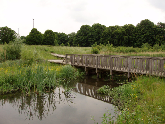 Речка Квогги, Хэрроу-мидоус, Лондон